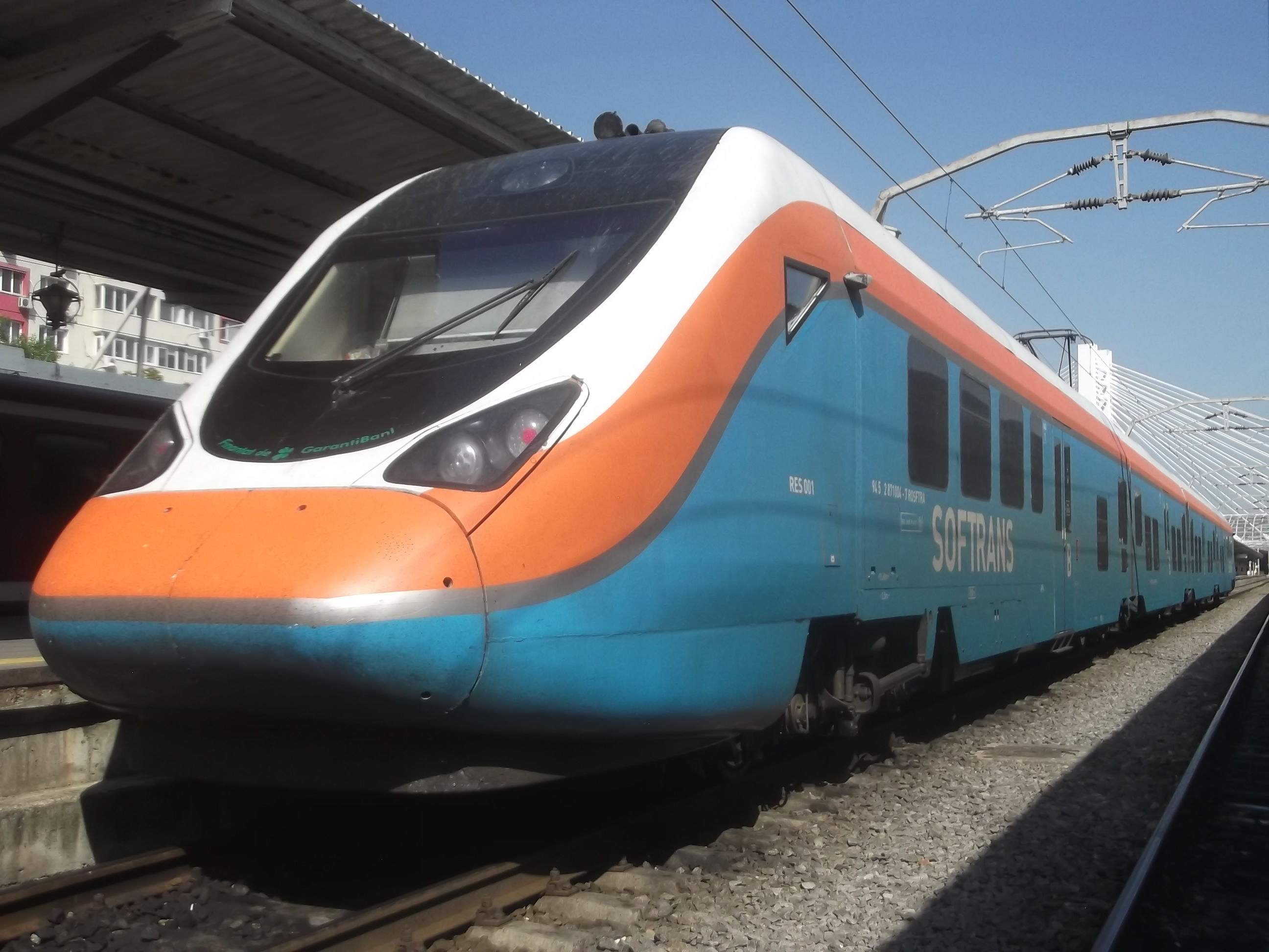 Rama Hyperion 001 în Gara de Nord, în schema de vopsire originală, pe 11 iunie 2016.